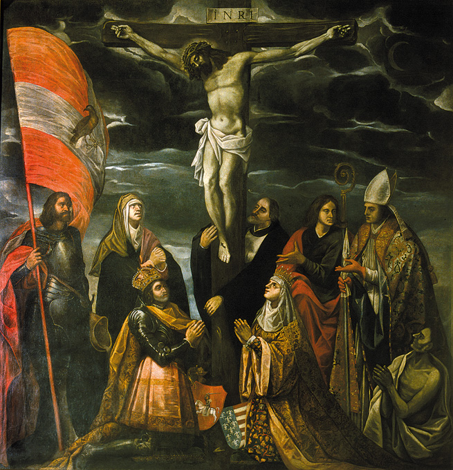 Беларуская (тарашкевіца): Вялікі князь літоўскі і кароль польскі Ягайла (Jagajła) з жонкай Ядвігай Анжуйскай